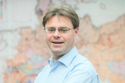 Jürg Fleischer, Professor für germanistische Sprachwissenschaft